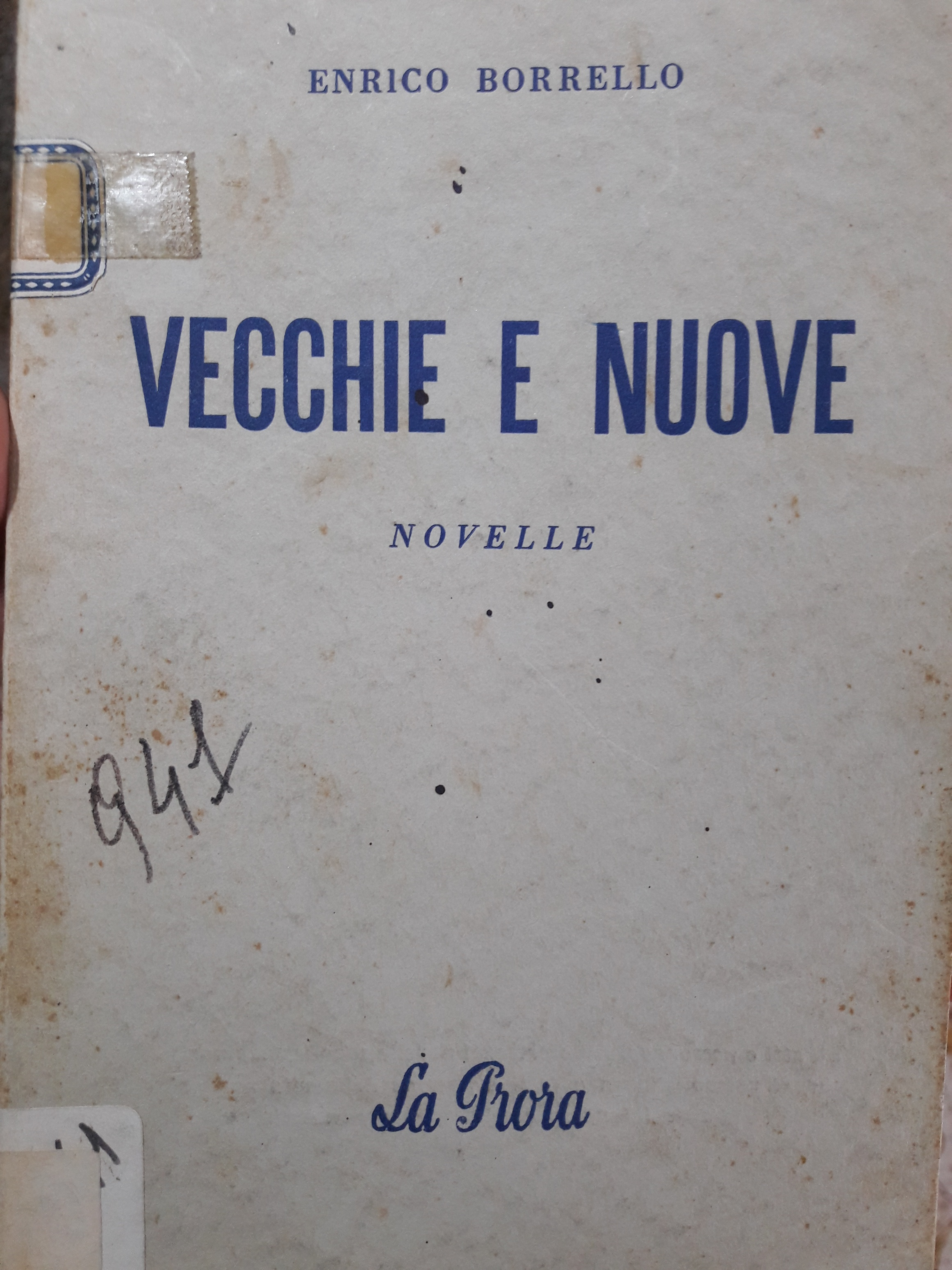 Raccolta di novelle di Enrico Borrello